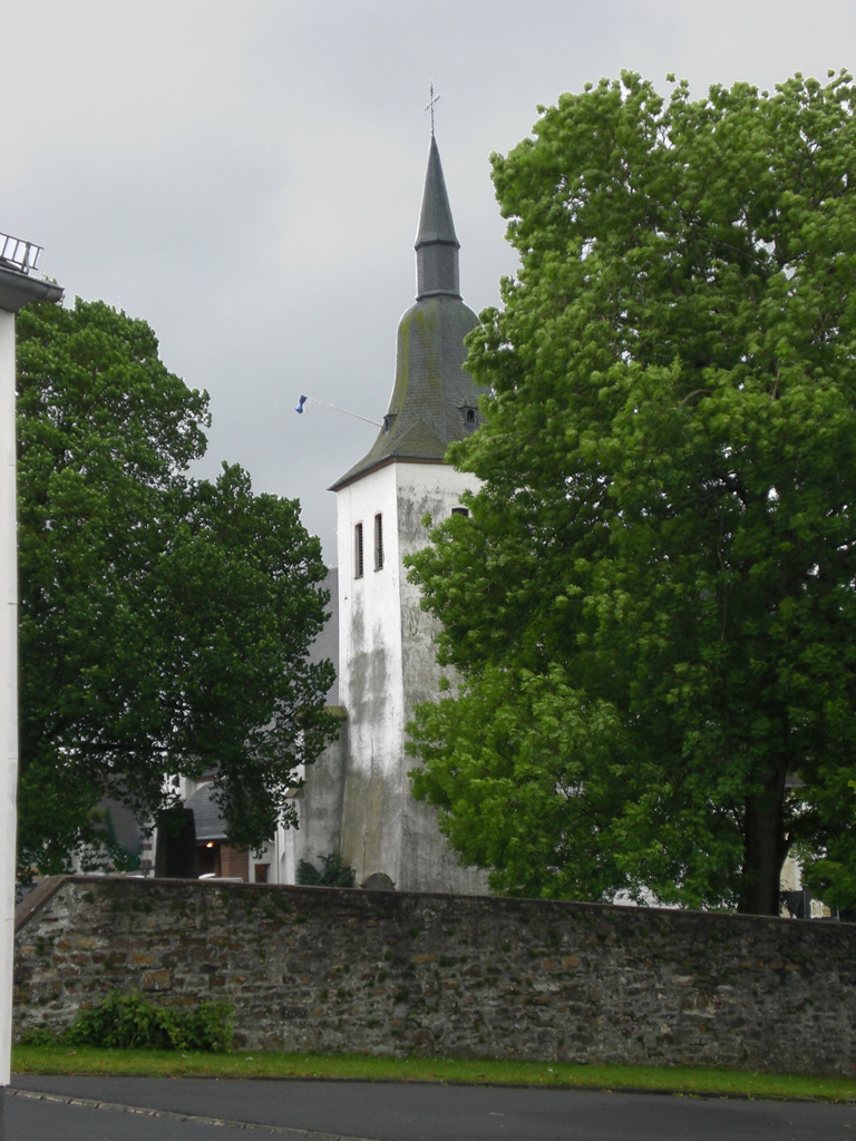 Kirche Mariä Himmelfahrt, Bleialf (Eifel)